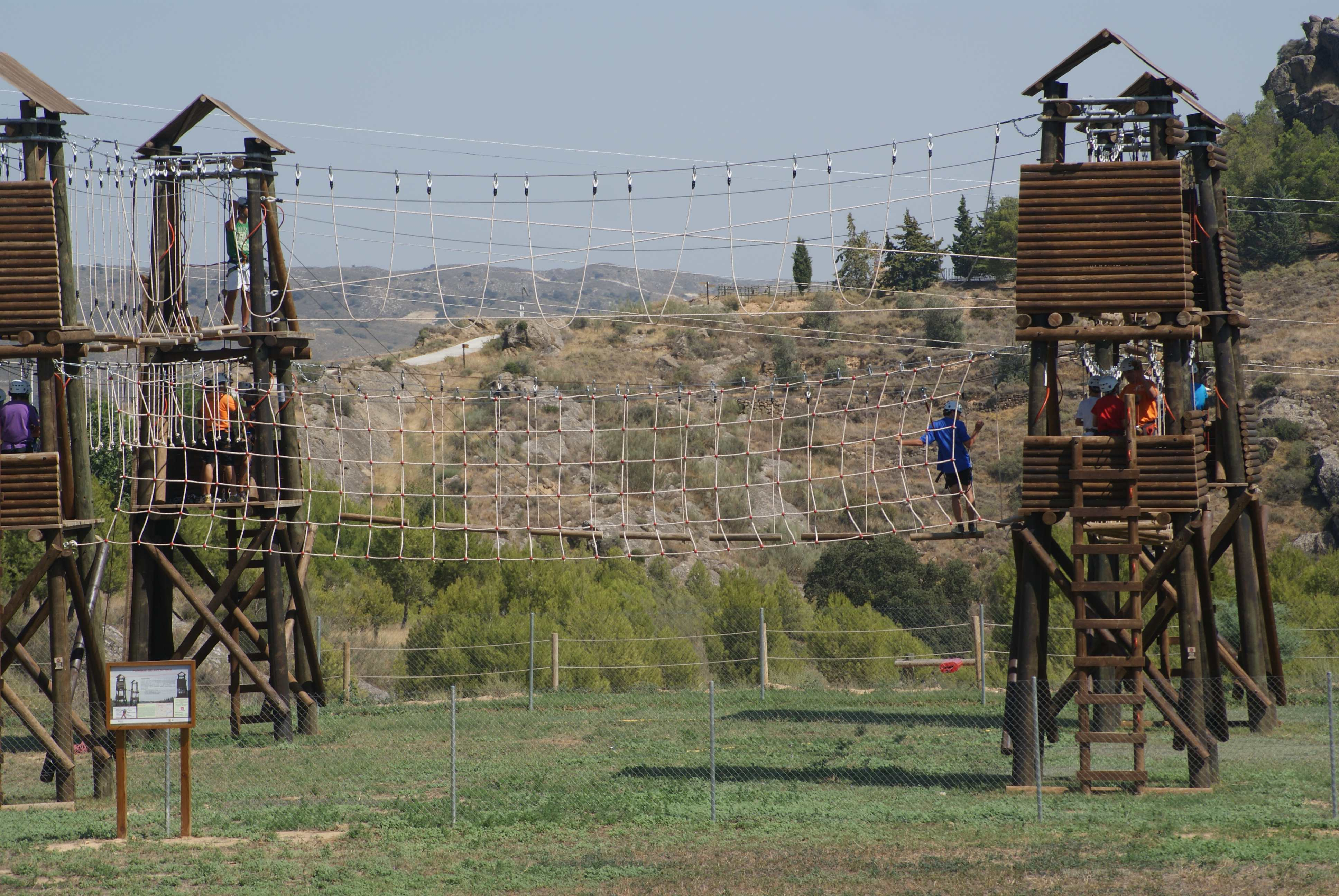 Parque de Aventura "Los Palomares" en Castejón del Puente en la Comarca del Somontano de Barbastro